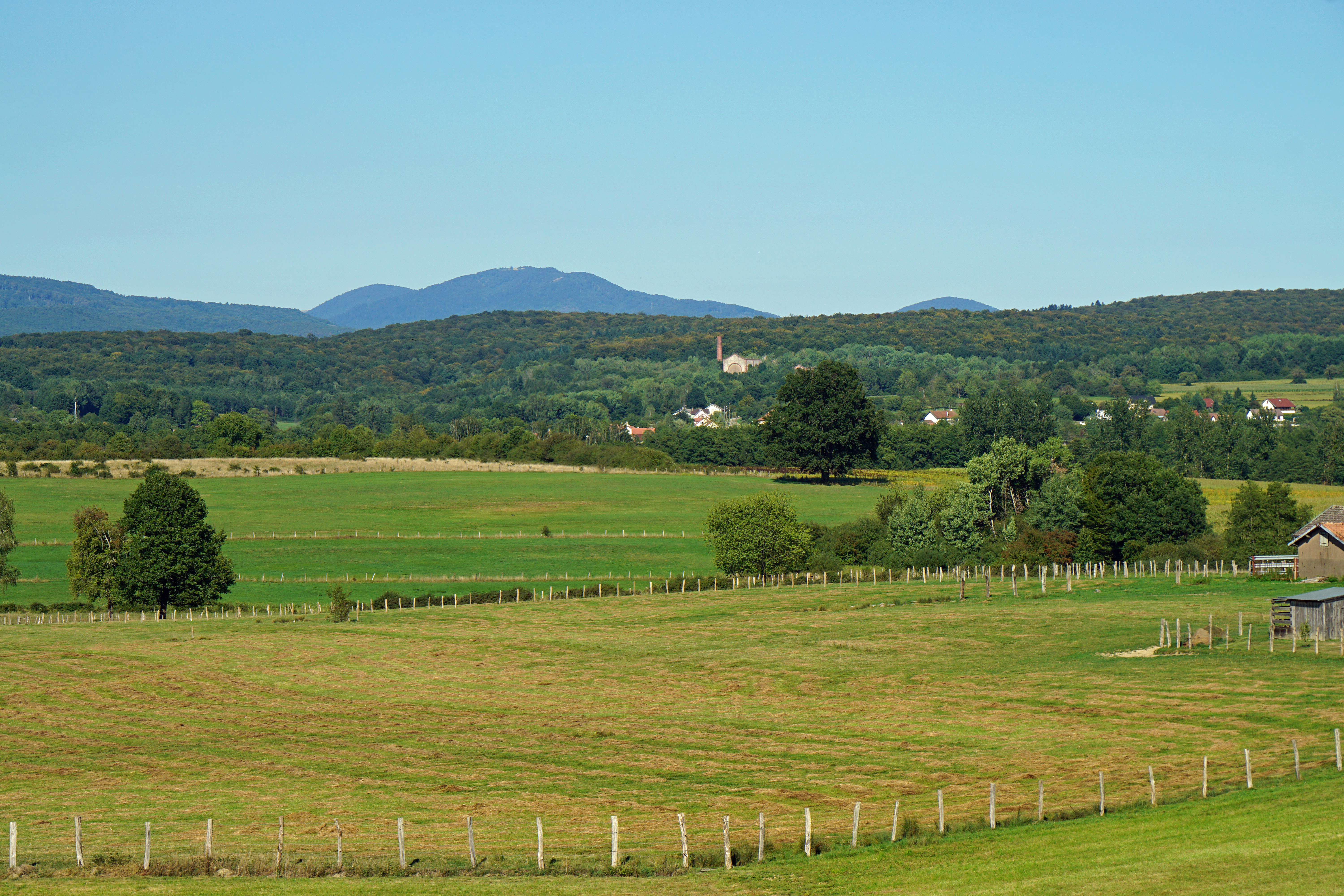 Campagne aux alentours de Palante, vue depuis le village.